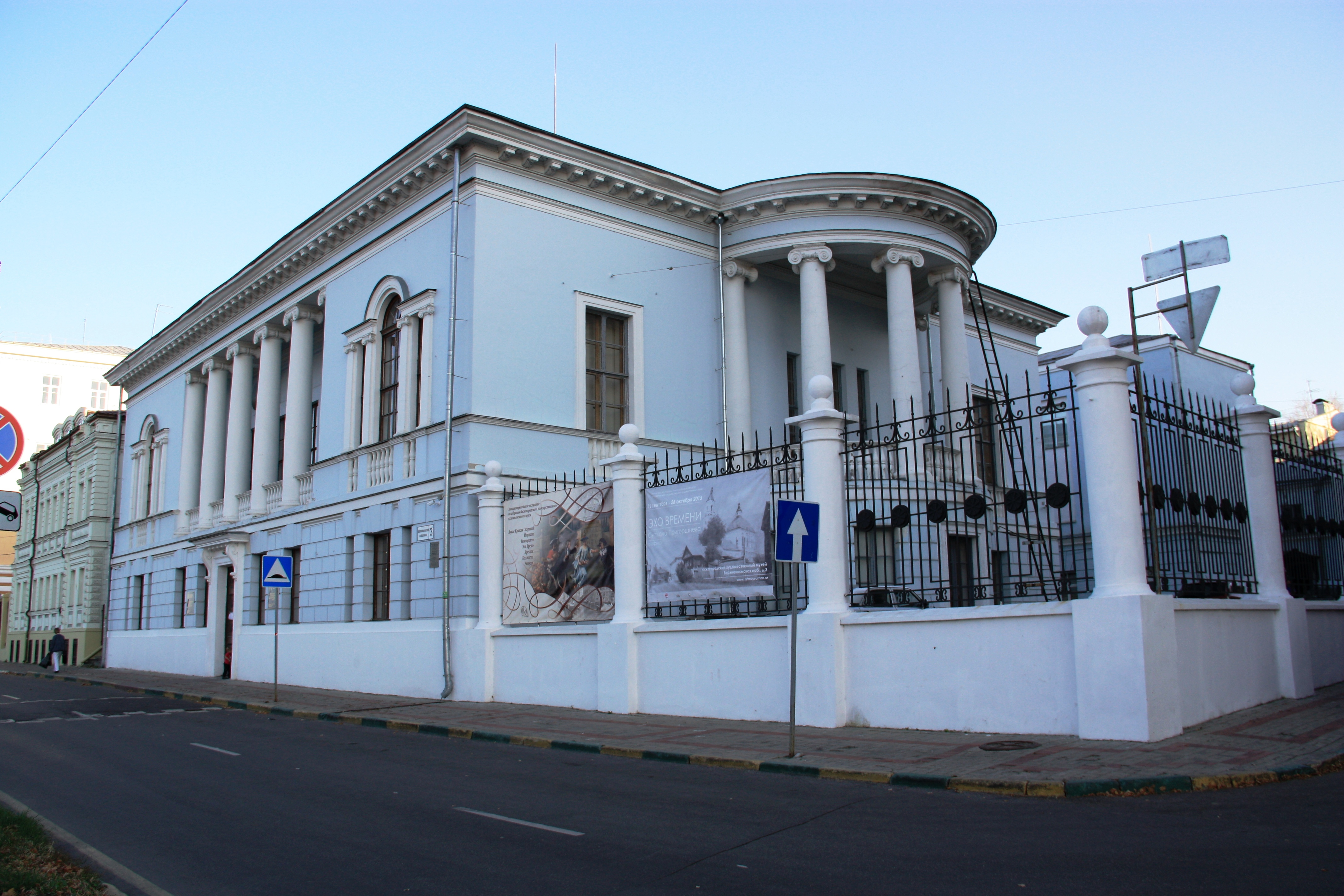 Дом Сироткина Д.В. с росписью плафонов: набережная Верхневолжская, 3, Нижний Новгород, Нижегородская область